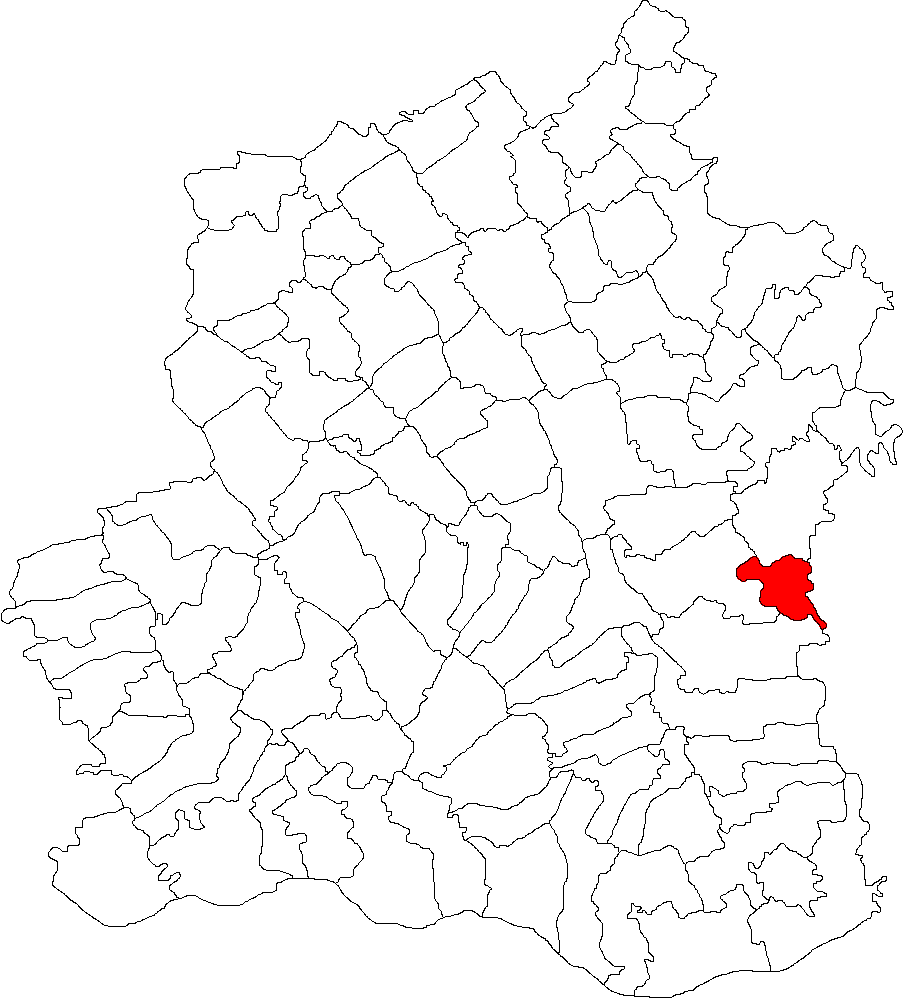 Categorie:Hărţi ale judeţului Teleorman